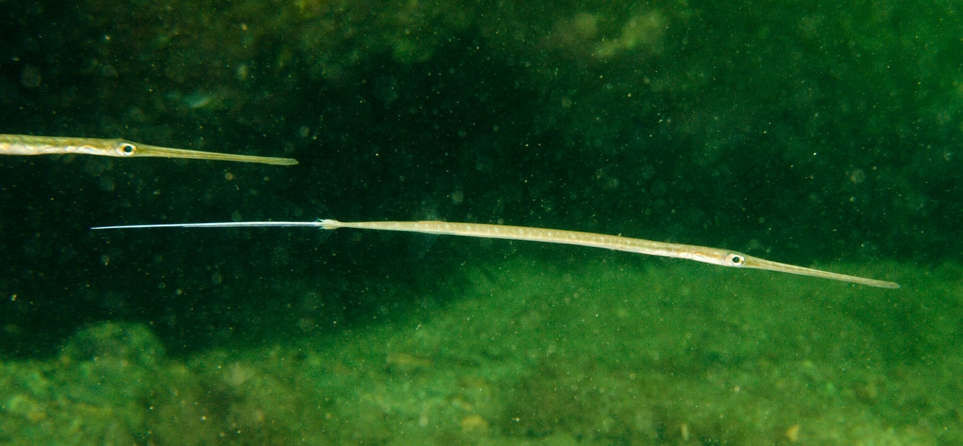 Fistularia petimba, en la bahía de Chowder, Australia